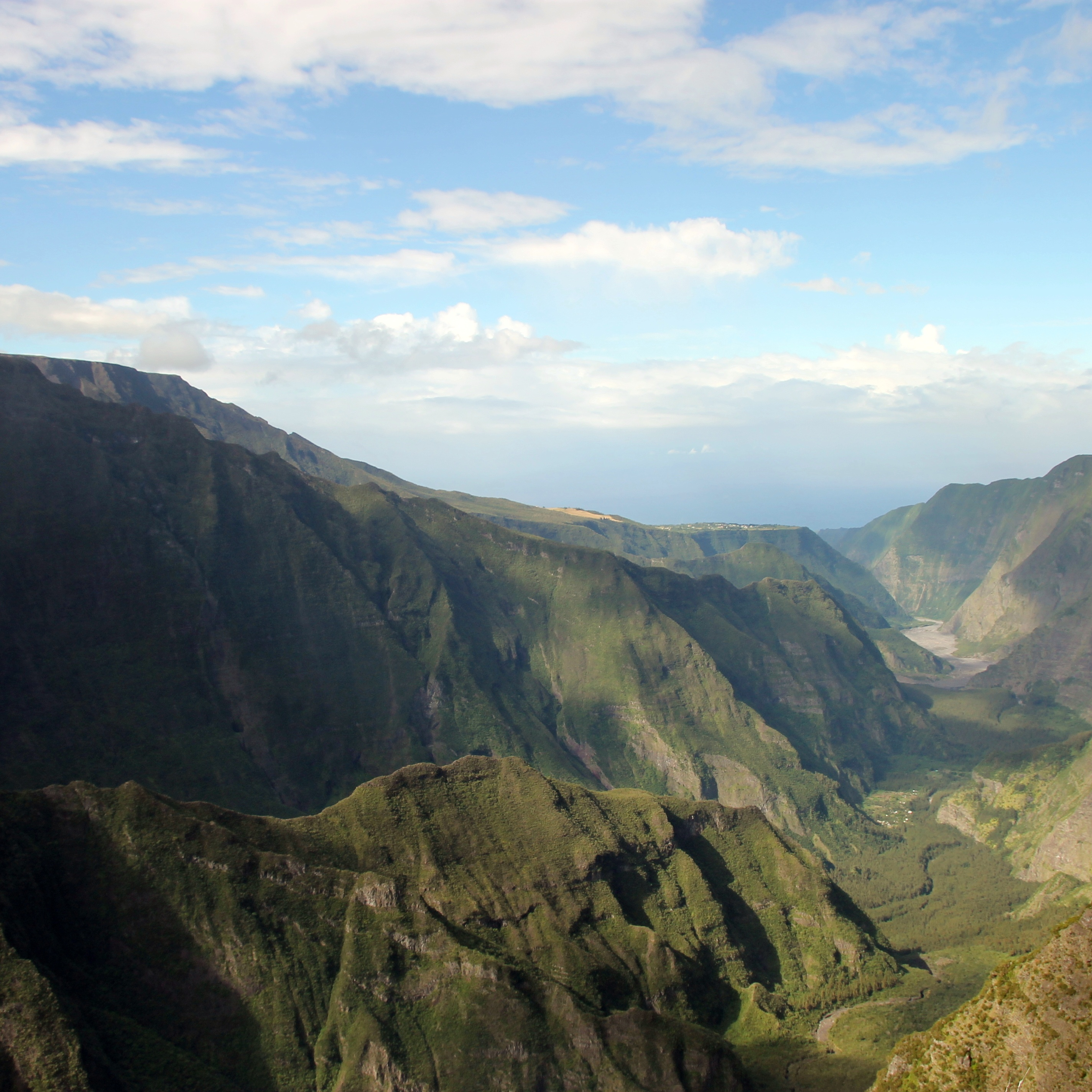 Reunion, franz. Departement im Pazifik: Ravine im Vulkangestein.